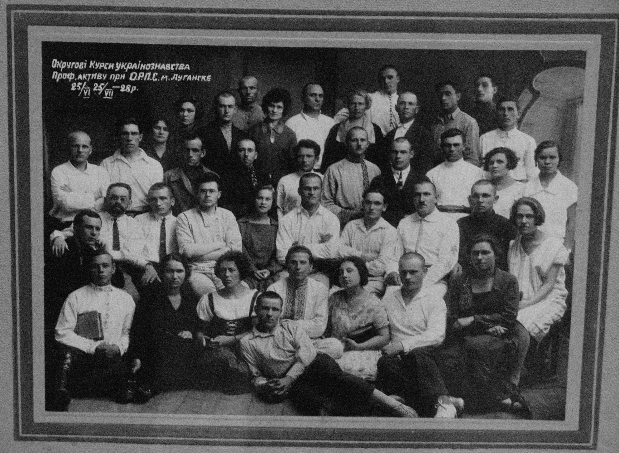 Округові курси українознавства проф. активу при О.Р.П.С./округовій раді професійних спілок/ м. Луганське 25/VI-25/VII-28 р. З залів луганського краєзнавчого музею.